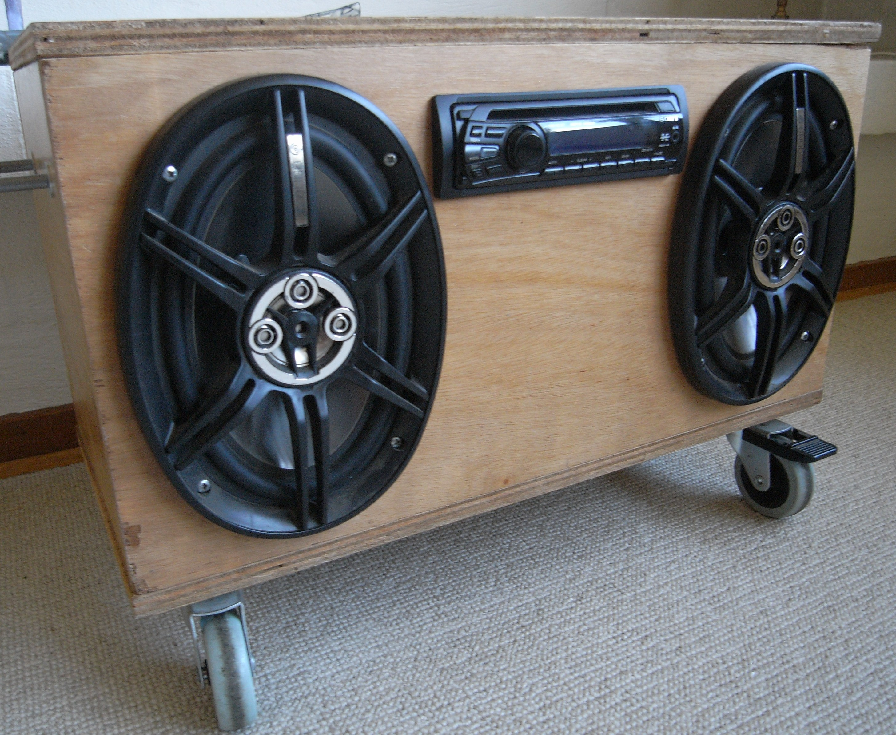 Festivalanlæg fra Skive Festival 2011